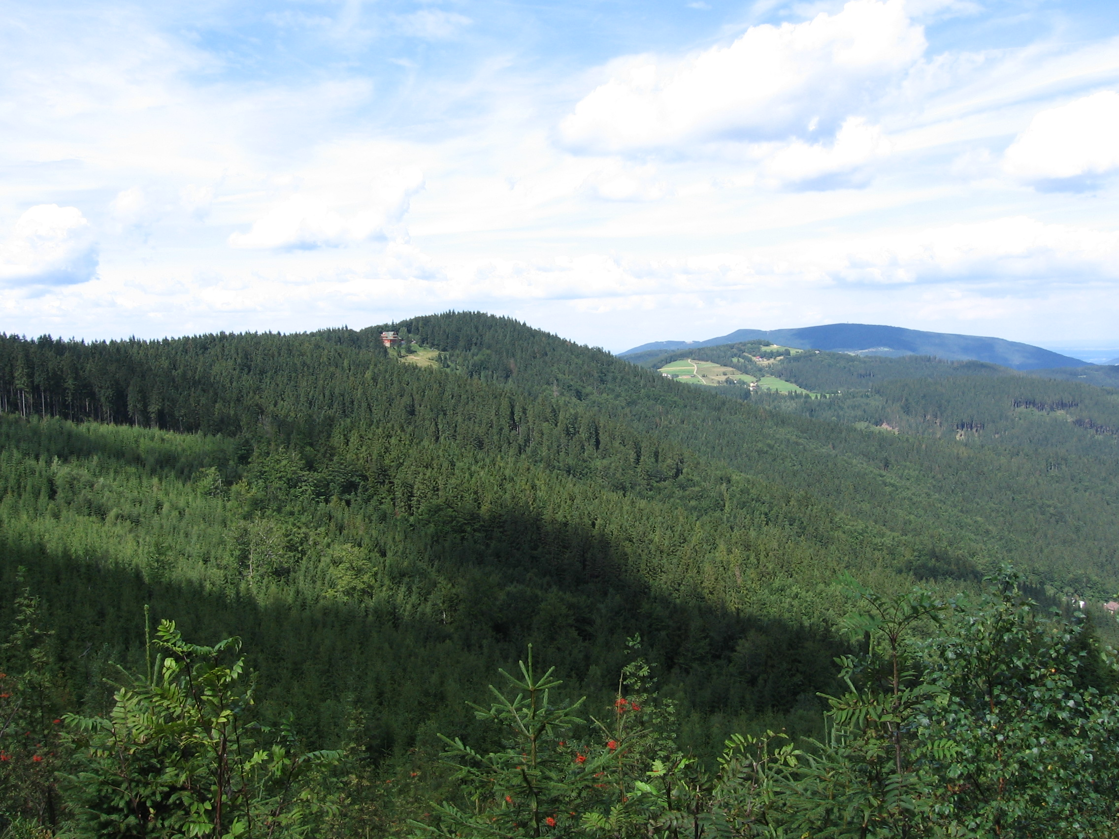 Stożek Wielki (Beskid Śląski)